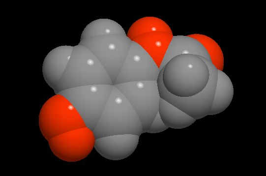 Polar surface area of paracetamol